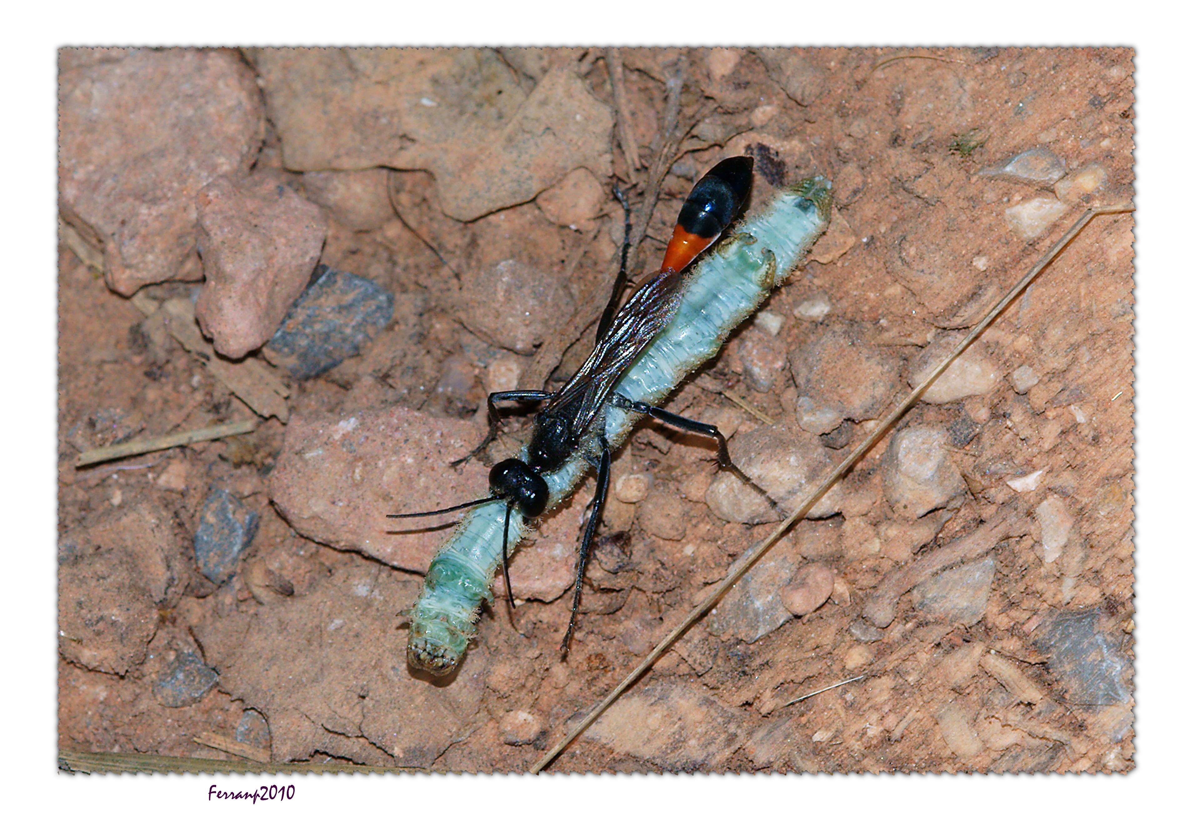 Esta es una hembra de Ammophila sp., el más común de nuestros Esfégidos de tamaño grande. Bajaba el talud de la balsa que hay en la fuente de la Sentiu, en Gavà, arrastrando una larva cuyo volumen, como podéis apreciar, sería cuádruple que el suyo. Inmovilizada la presa, como es sabido que ocurre, a consecuencia de las picaduras del aguijón del himenóptero en los centros nerviosos, las cuales producen la parálisis, marchaba la Ammophila a caballo sobre su víctima. Es notable la velocidad con que camina, a pesar de que, por lo grueso de la larva, las patas del esfégido llegan con dificultad al suelo, sin que, no obstante el desnivel bastante fuerte y los abundantes obstáculos que encuentra, no suelta nunca la presa, bueno, sólo la soltó un momento cuando se dio cuenta de mi presencia que consideró un peligro, pero después de unos minutos, al verme completamente inmóvil, debió reconsiderar su decisión y volvió con mas ímpetu a arrastrar a su presa hasta la entrada de su madriguera, justo al pié de la fuente. Aquí os dejo la secuencia.